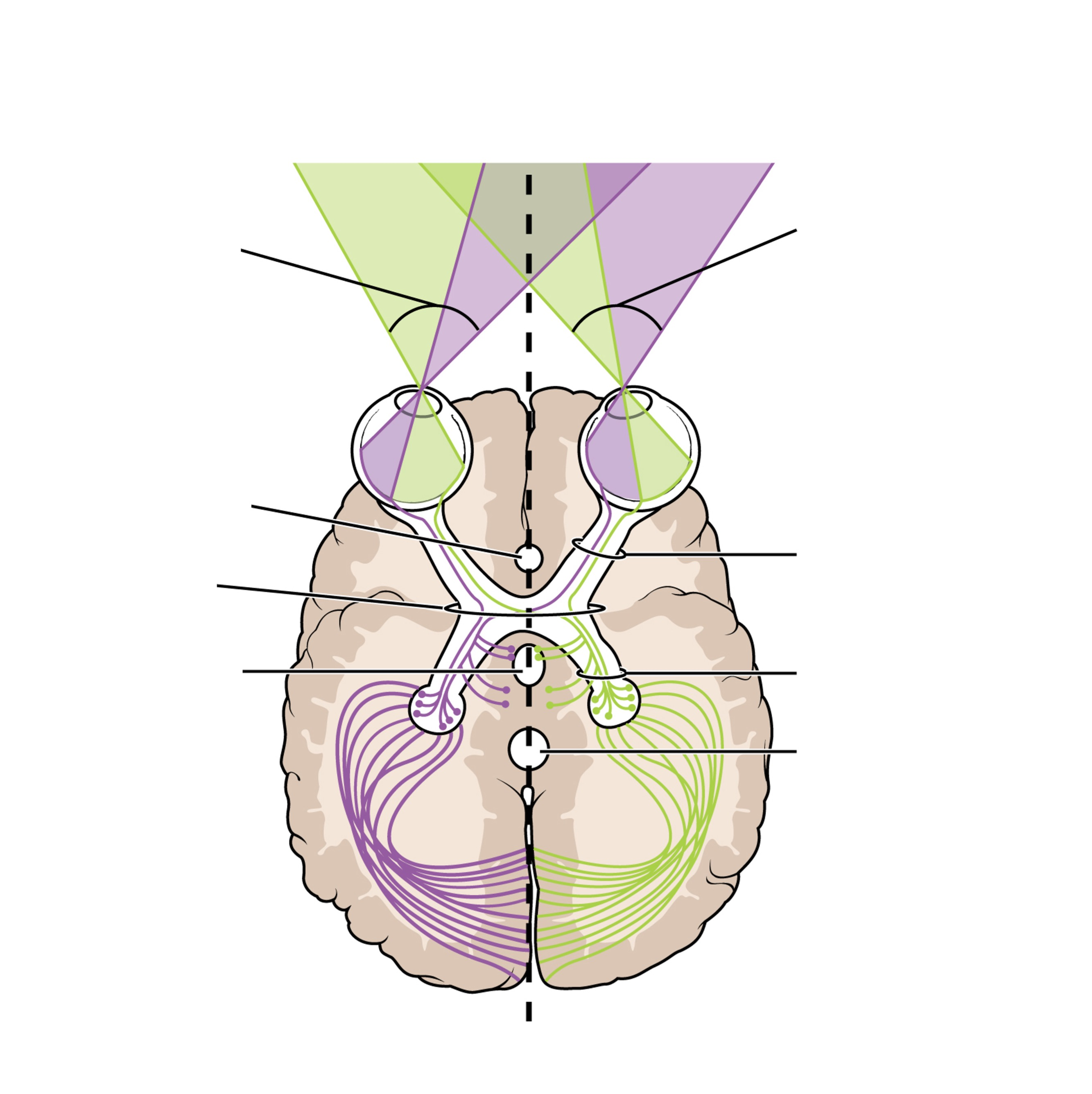 Esquema en el que se representan los campos visuales del ojo derecho e izquierdo, asi como las principales vias neurológicas que sigue la información visual en el cerebro.